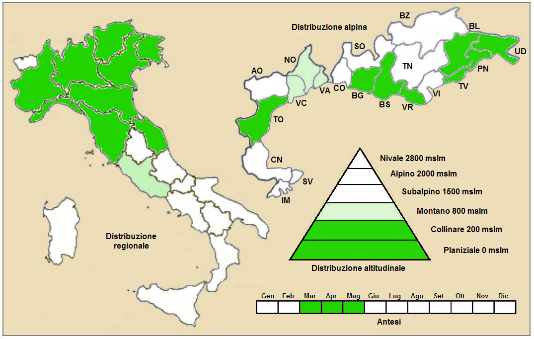 Isopyrum thalictroides - Distribuzione